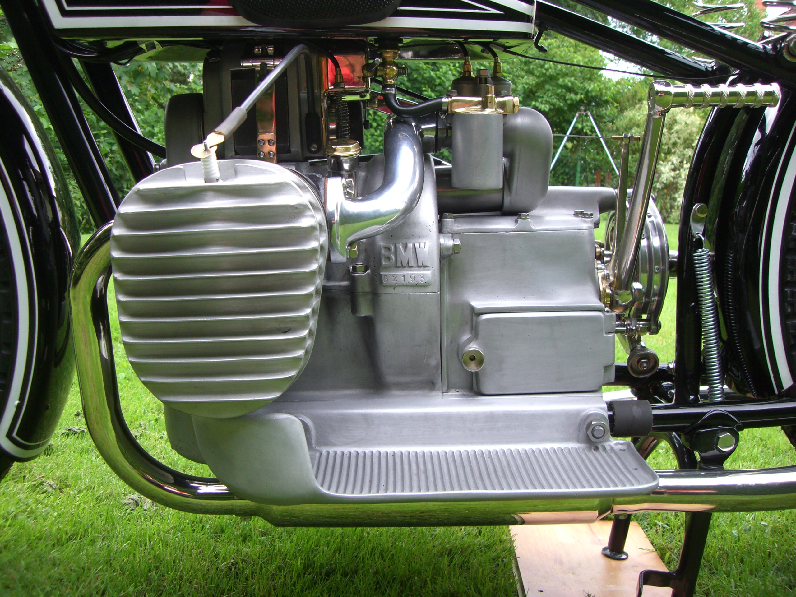 BMW R 62: Motor von links